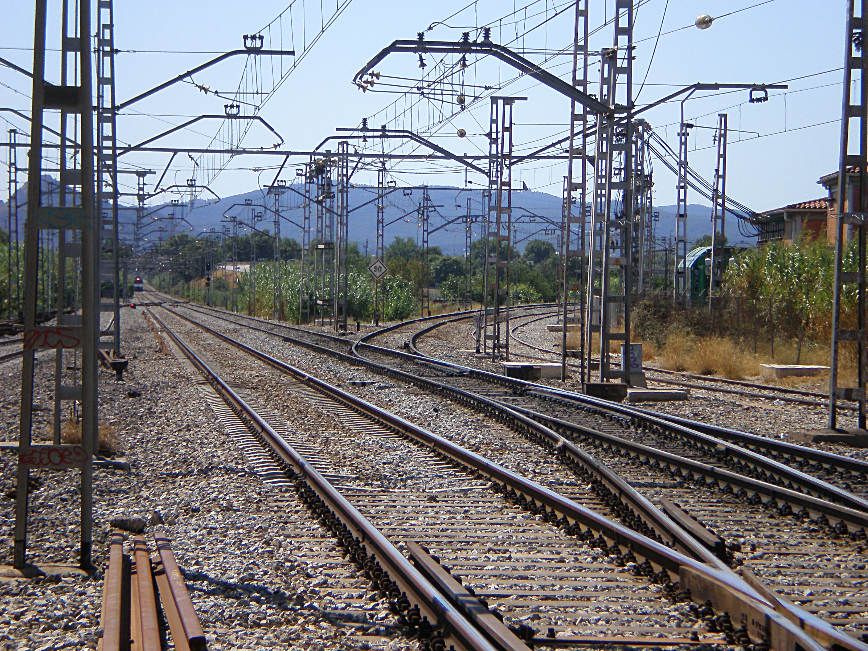 Estació de Mollet - Sant Fost: Inici de la línia de ferrocarril Mollet - Papiol / Castellbisbal (vies que surten cap a la dreta) a la línia Barcelona - Granollers - Portbou - Cerbère.